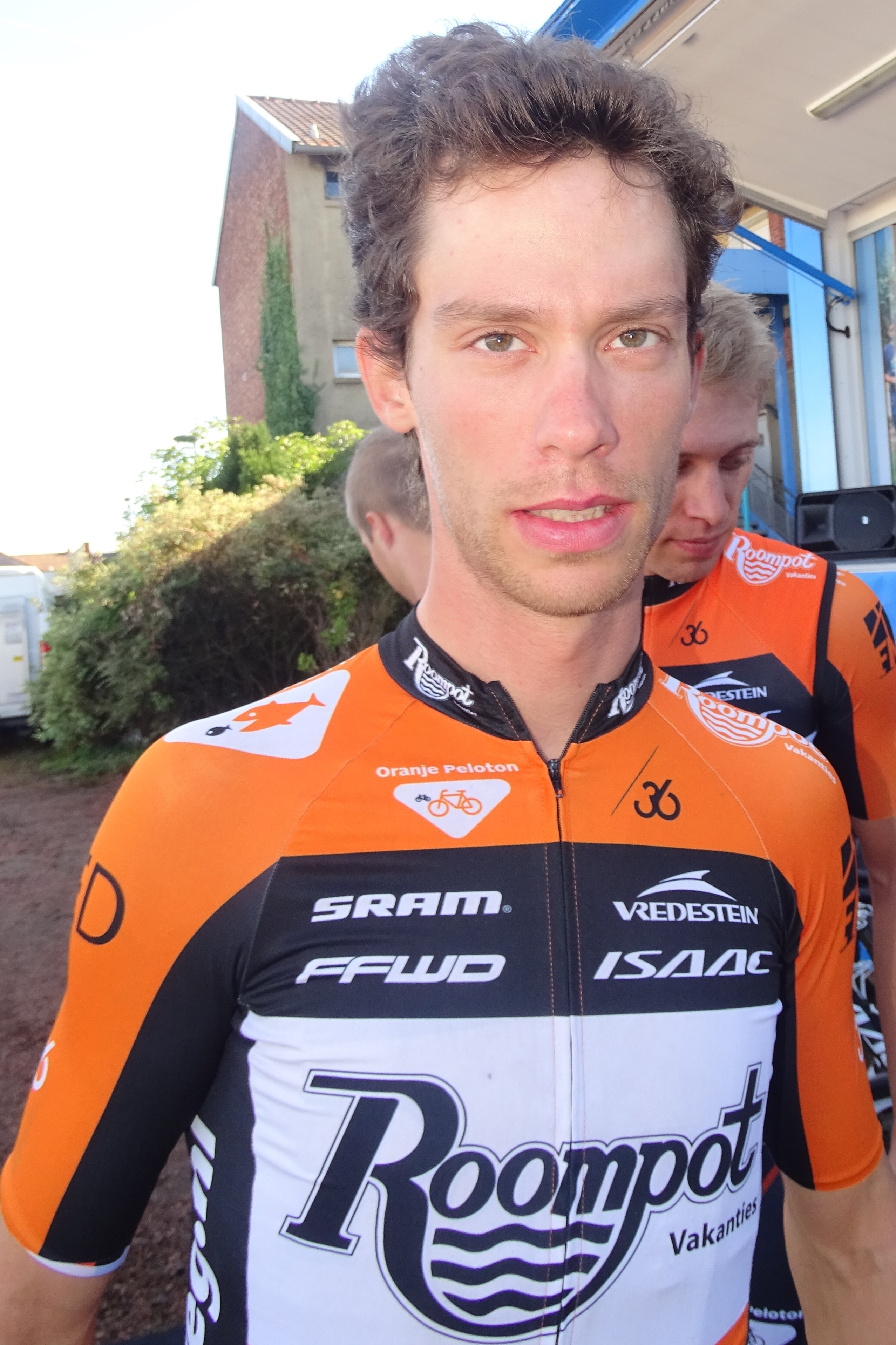 Reportage réalisé le dimanche 20 septembre à l'occasion du départ et de l'arrivée du Grand Prix d'Isbergues 2015 à Isbergues, Nord-Pas-de-Calais, France.